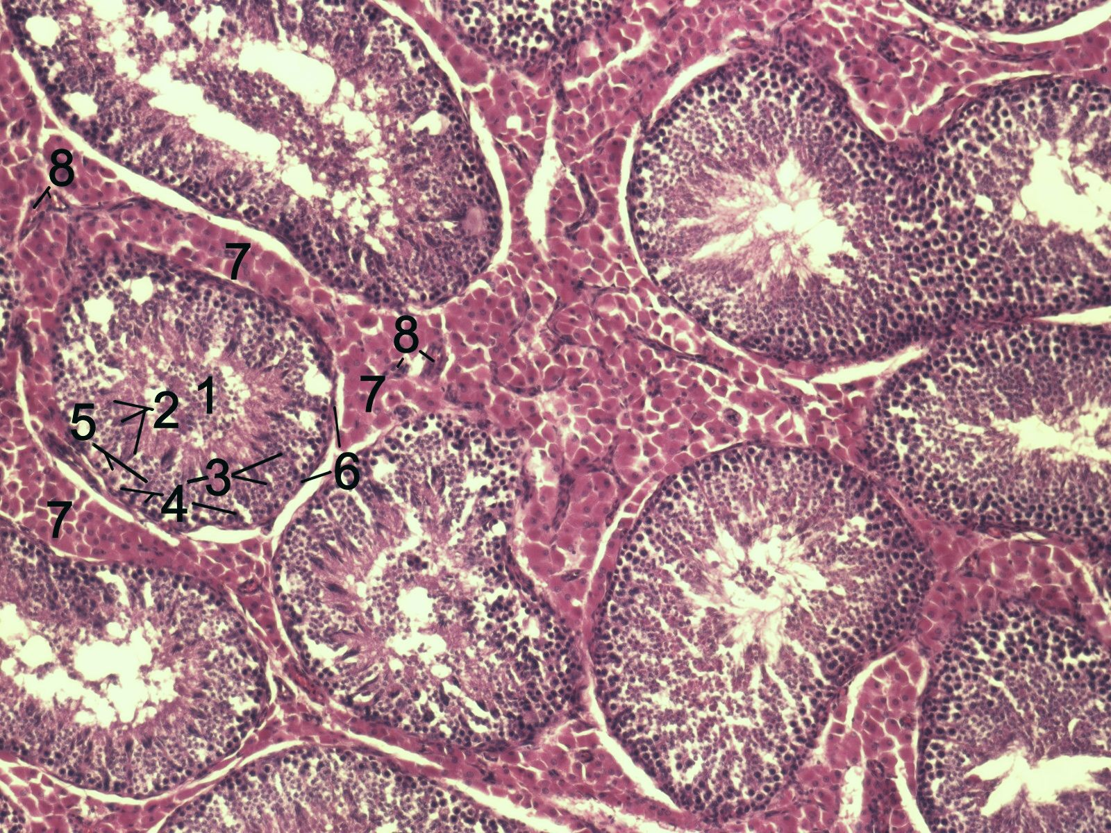 Corte histológico do parênquima testicular de javalis. 1 - lúmen do Túbulo Seminífero complicadas; 2 - Espermátides; 3 - Espermatócitos; 4 - Espermatogônias; 5 - Células de Sertoli; 6 - Miofibroblastos; 7 - Células de Leydig; 8 - Capilar